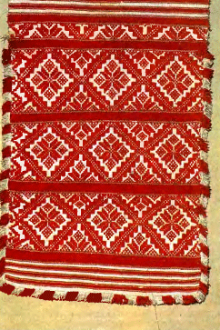 Ручнік з узорам Спарыша